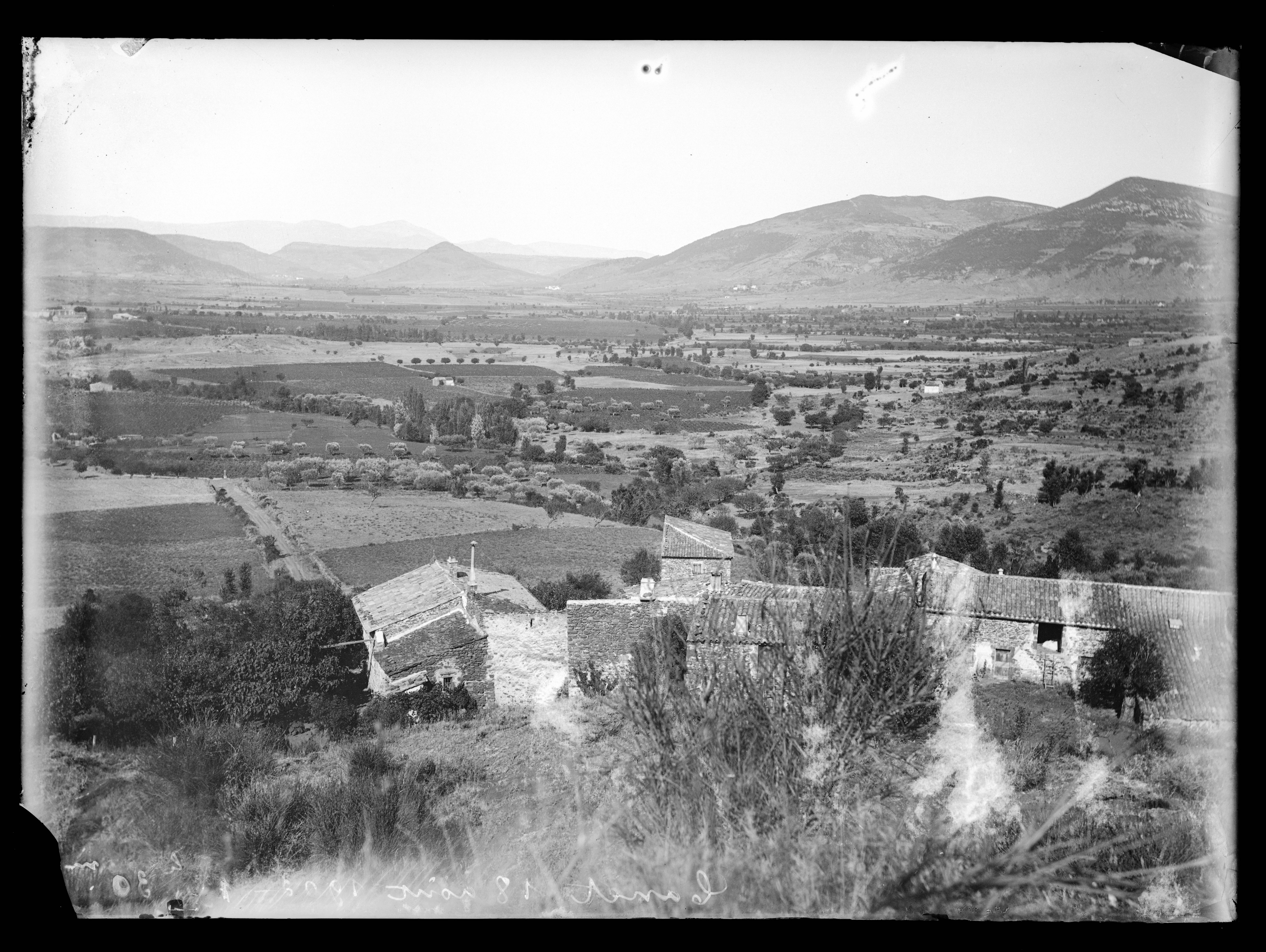 Canet. - Vue générale, 18 août 1903 : photographie.